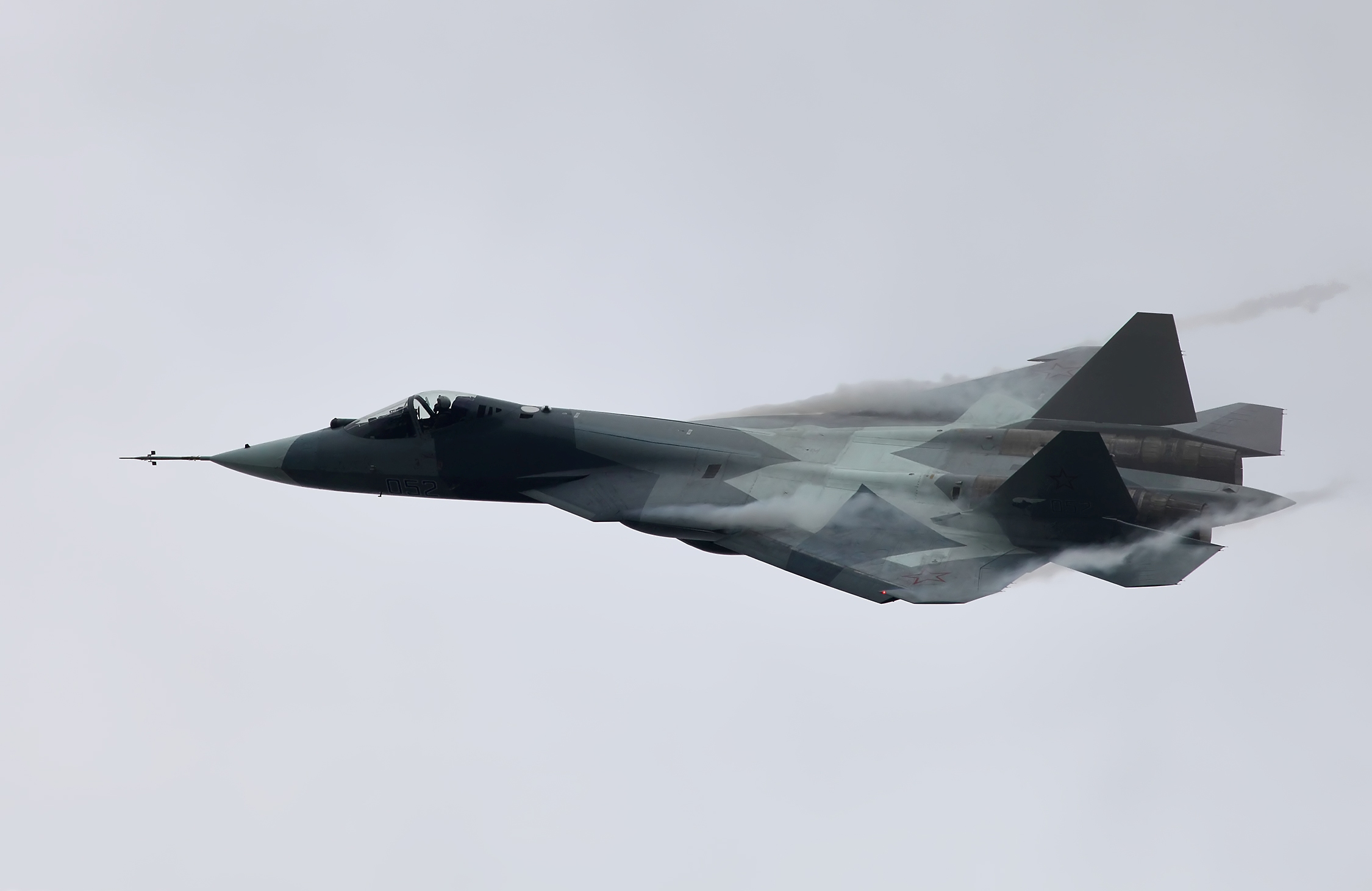 Т-50 ПАК ФА (T-50 PAK FA)